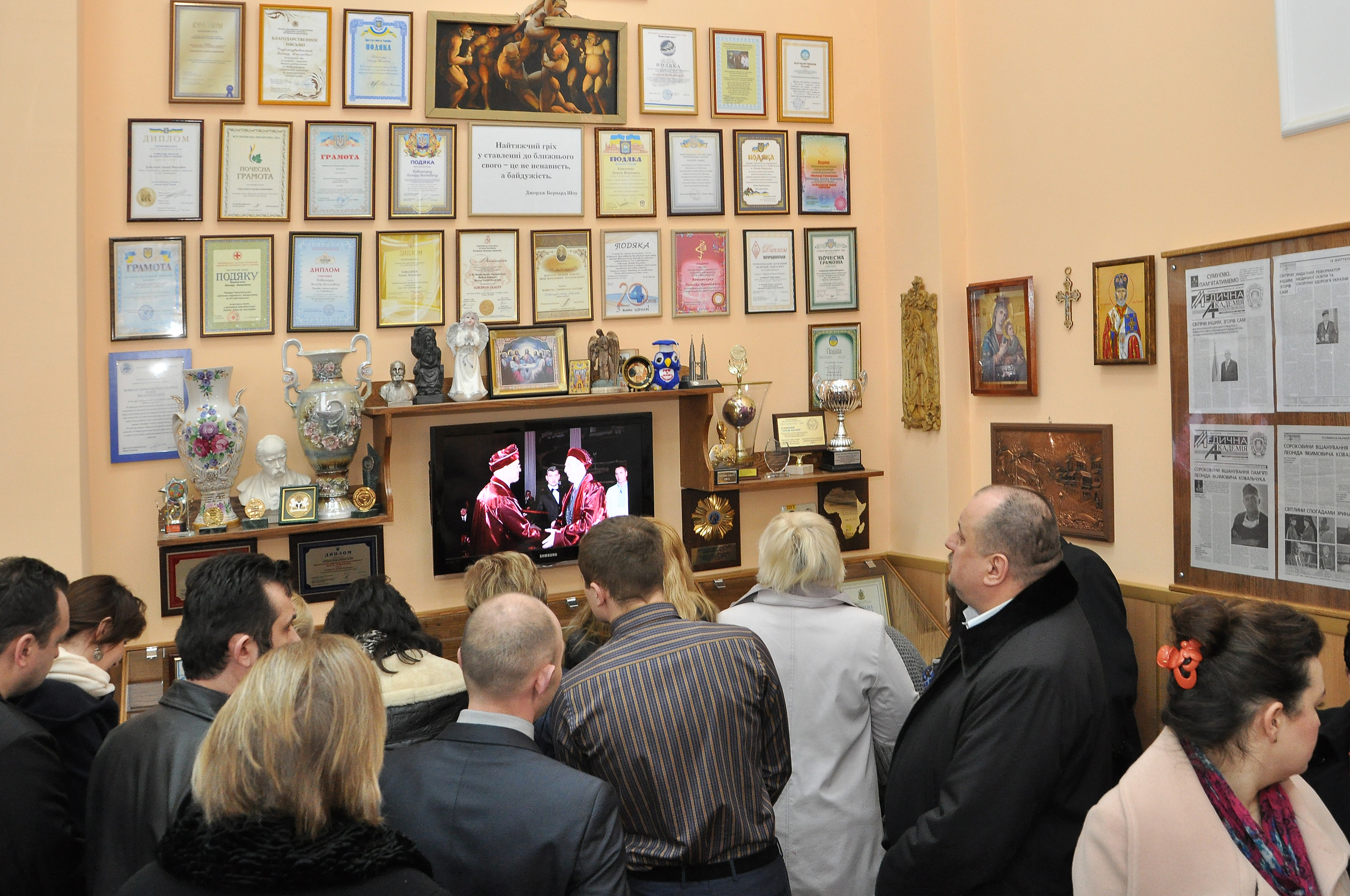 Відкриття Музею Леоніда Якимовича Ковальчука в Тернопільському державному медичному університеті імені І. Я. Горбачевського.